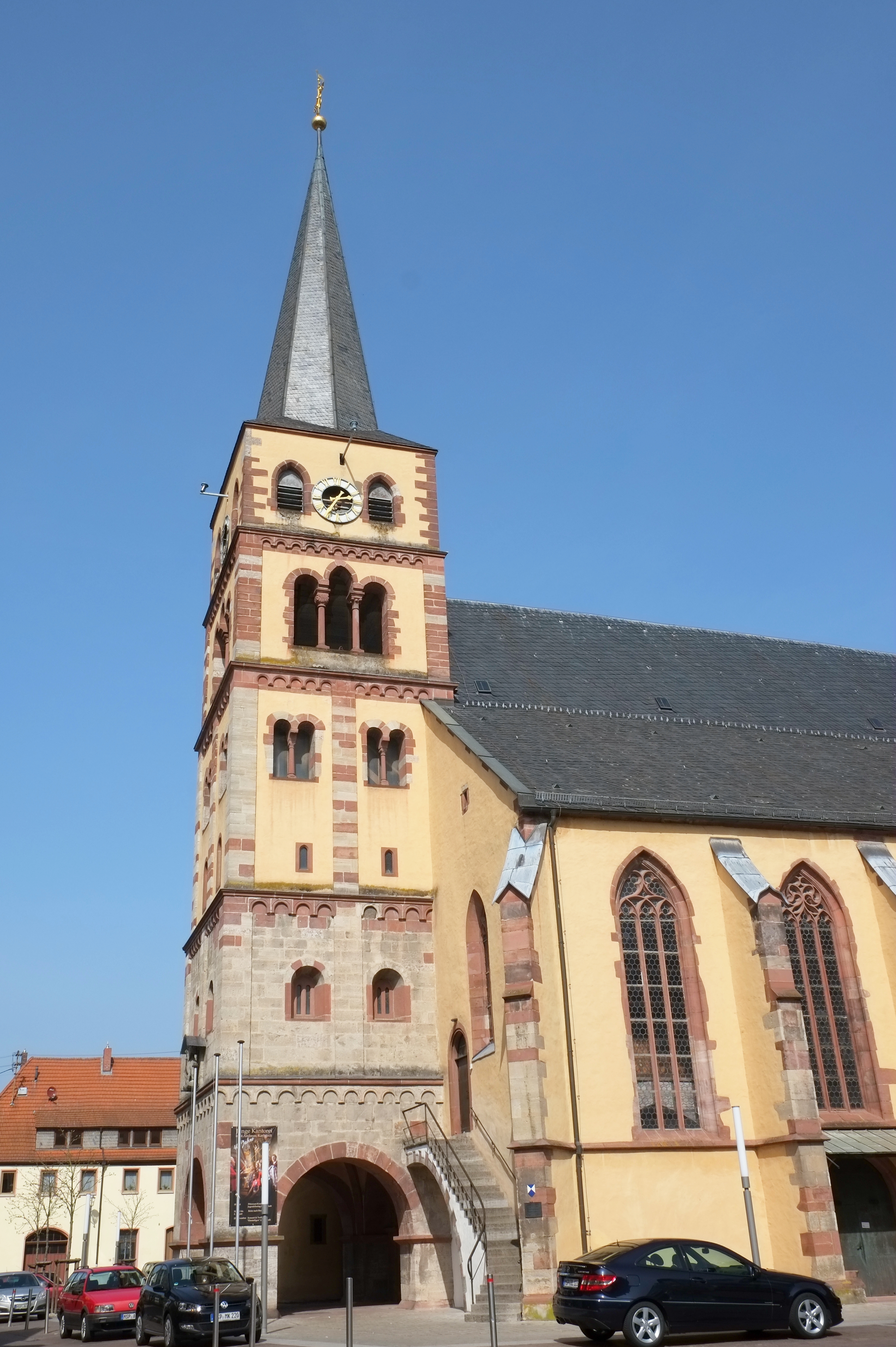 katholische Pfarrkirche St. Andreas in Karlstadt im Main-Spessart-Kreis (Bayern, Deutschland)